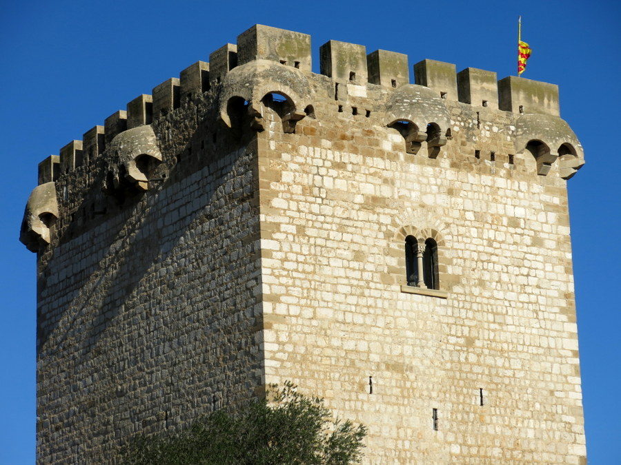 Torre de la Carrova a Amposta - Baix Ebre - Catalunya